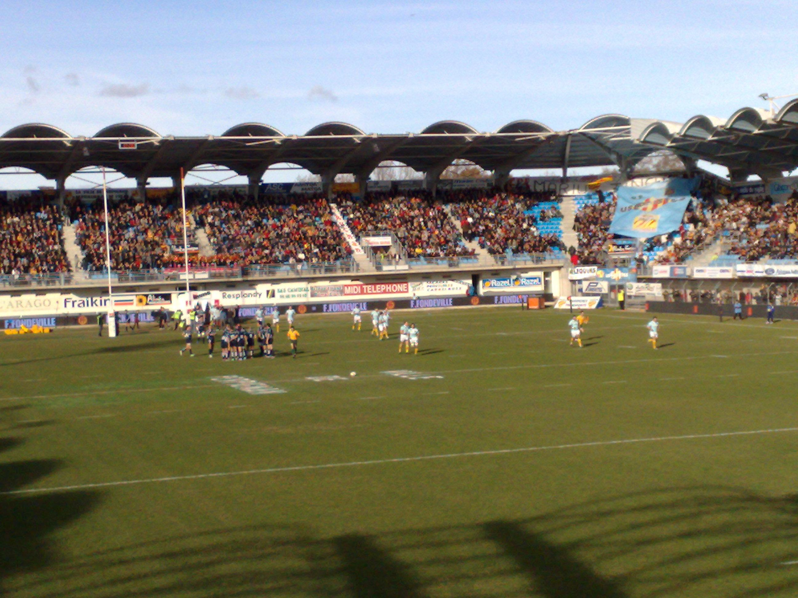 Stade Aime Giral durant le match Perpignan vs Castres.